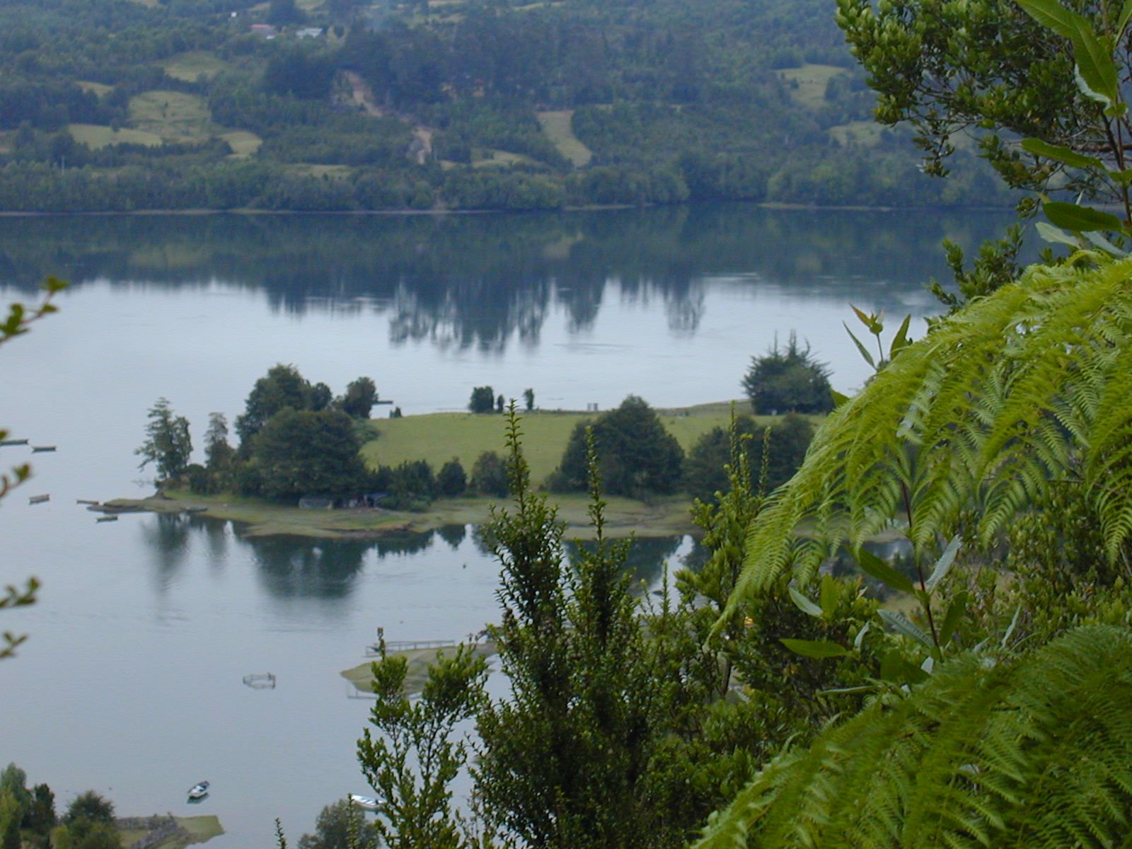 Vista de la isla de Chiloé0010A5091A00-0